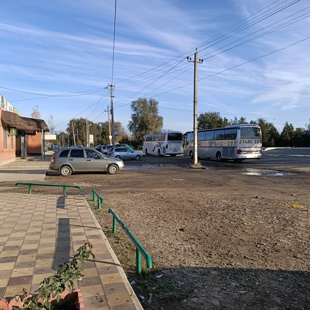 Фото стоянки междугородних автобусов дальнего следования. Пер. Западный, у старого автовокзала